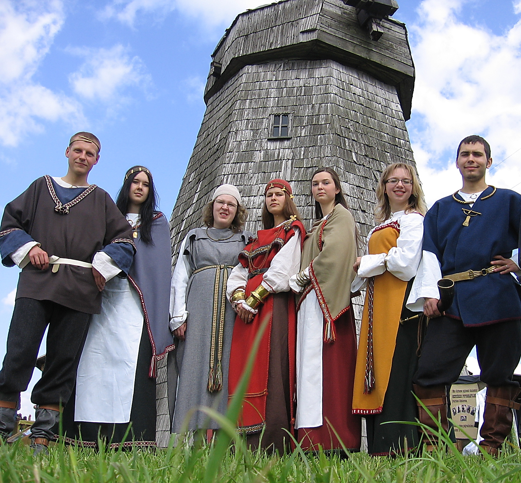 Fotografija, vaizduojanti Vaiguvos folkloro ansambl? - fotografijos autorius pats ?k?l? ?? darb? ir atsisako autorini? teisi? ? savo k?rin?.